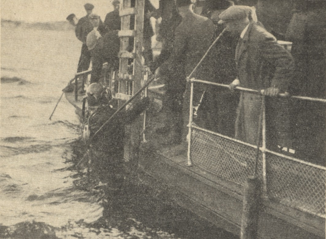 Description